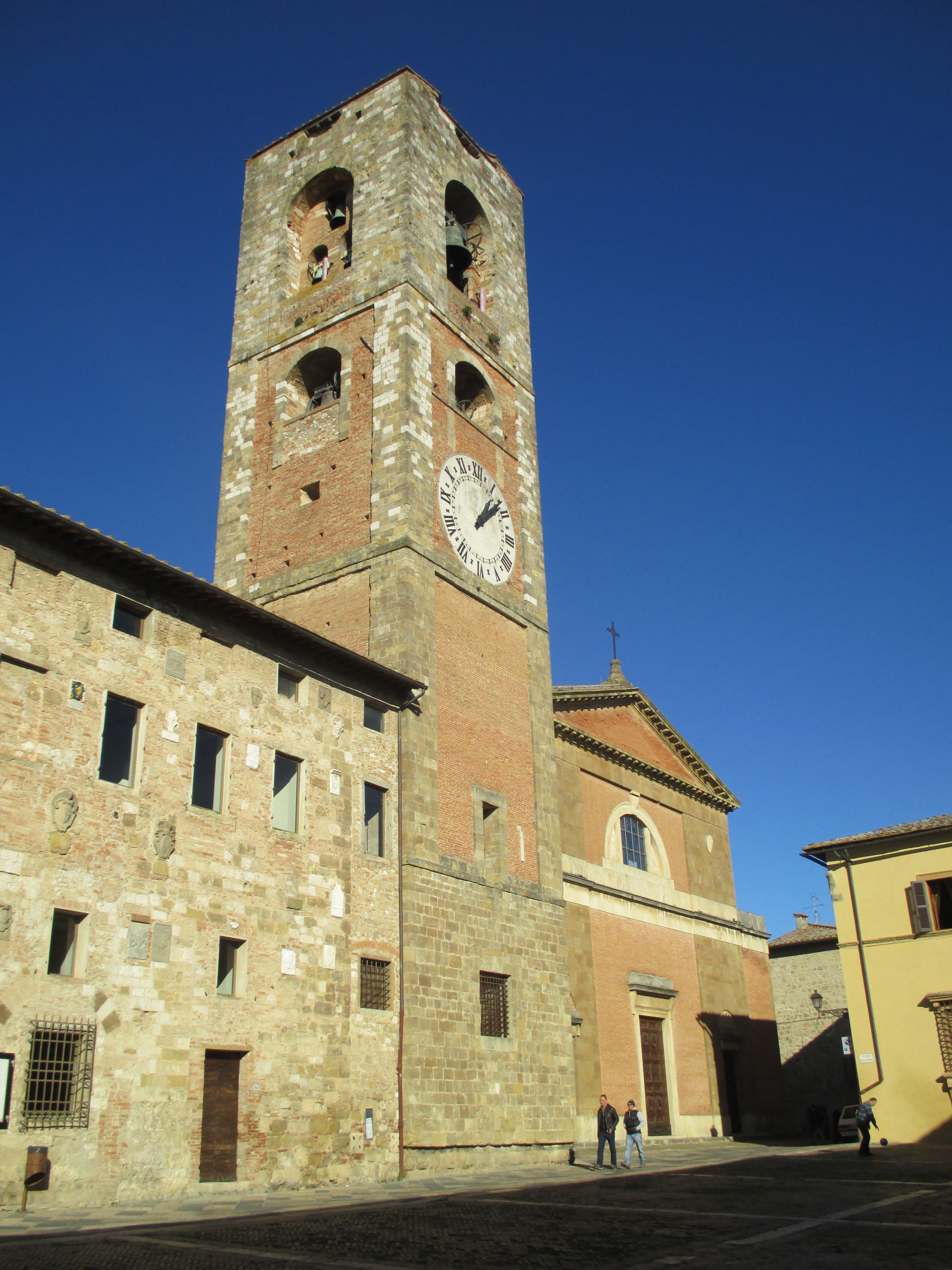 Colle Val d'Elsa: Duomo e torre campanaria.